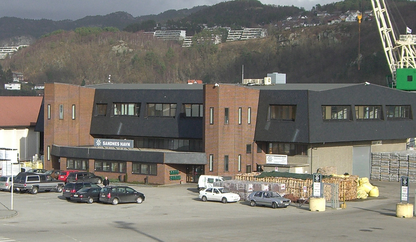 Sandnes Havn HQ in Elvegata